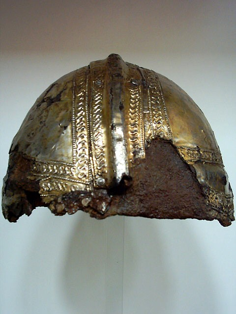 Vergoldeter römischer Gardehelm aus dem 4. Jahrhundert 1897 in Ulm-Pfersee gefunden. Augsburg (Bayern): Römisches Museum im Dominikaner-Kloster Bildautor: Peter Bubenik Aufnahmedatum: 04.09.2004 (Weiteres Bild)